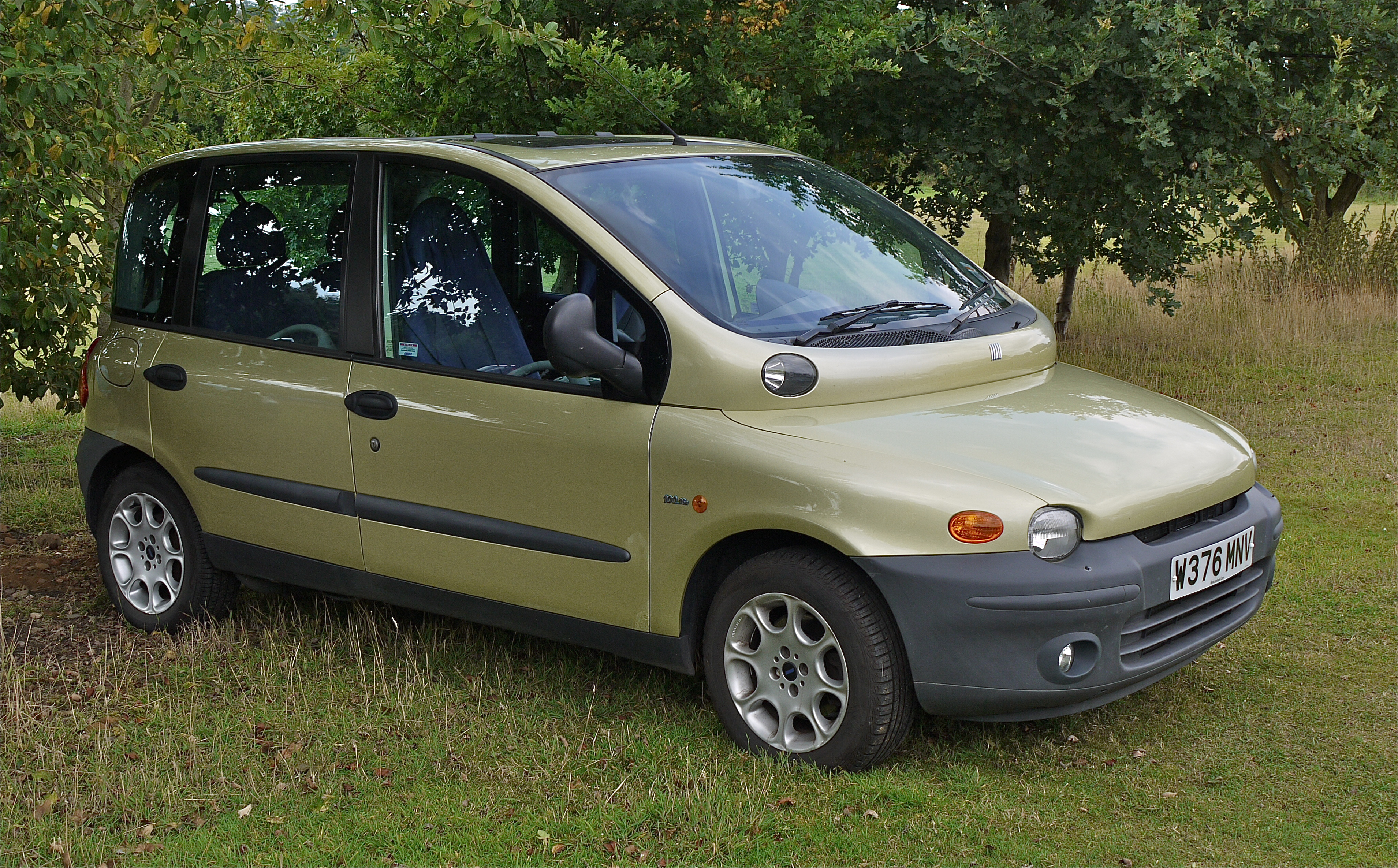 Panasonic G1 14-45 Lens